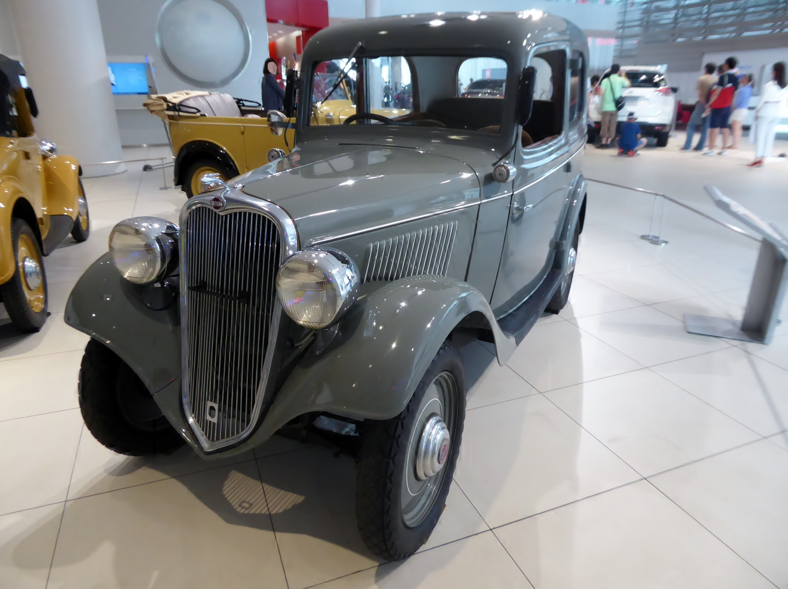 1935年式ダットサン・14型セダンを撮影。